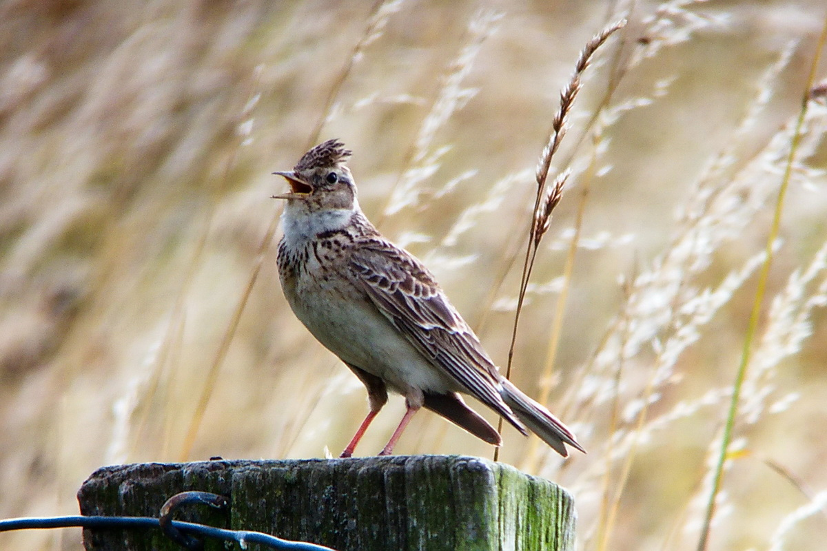 Feldlerche auf einem Zaunpfahl im NSG Bislicher Insel